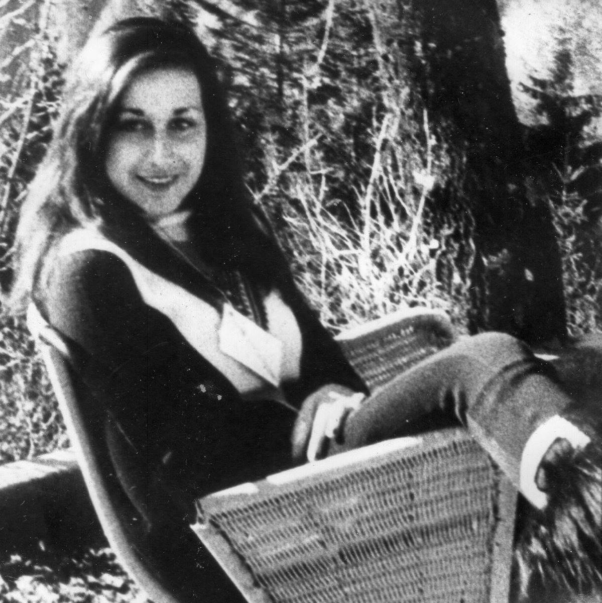 Graziella De Palo